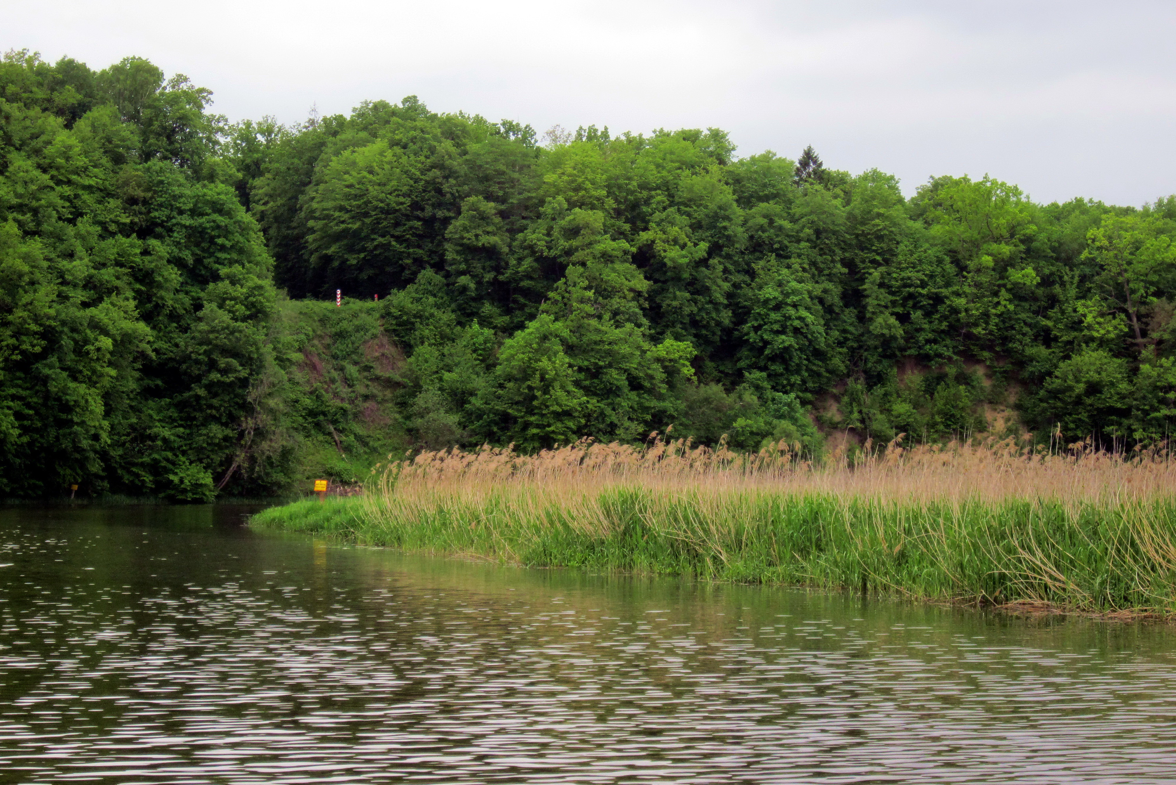 Granica Polski z Okręgiem Królewiecki (Rosja). Piękna rzeka Łyna.